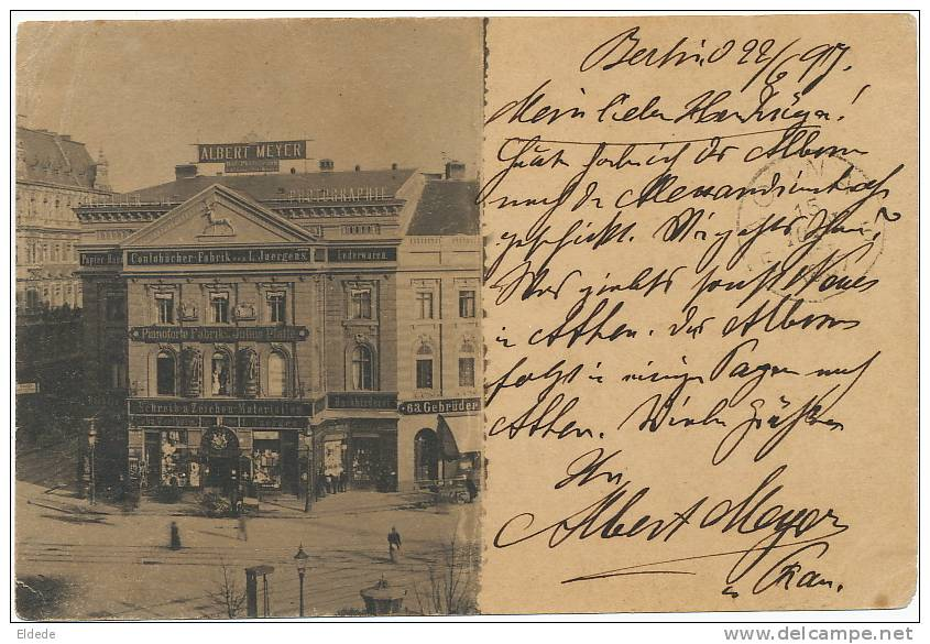 Handschriftlich von Albert Meyer geschriebene Ansichtskarte mit einer Ansicht des Ateliers des Photographen unter der Adresse Alexanderstraße 45 in Berlin. In dem Schreiben an den Direktor Krüger (vom Deutschen Export-Verband in Athen) kündigt Meyer die Zusendung eines ganzen Albums an.